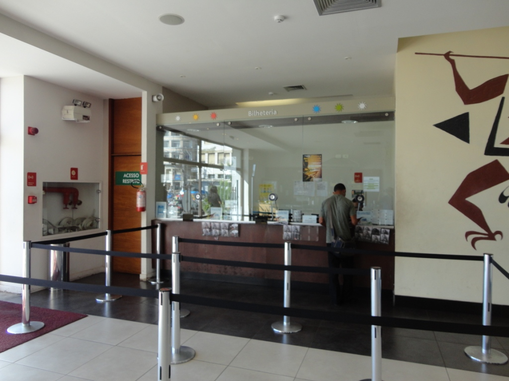 Bilheteria do Espaço Itau Glauber Rocha da cidade de Salvador, BA